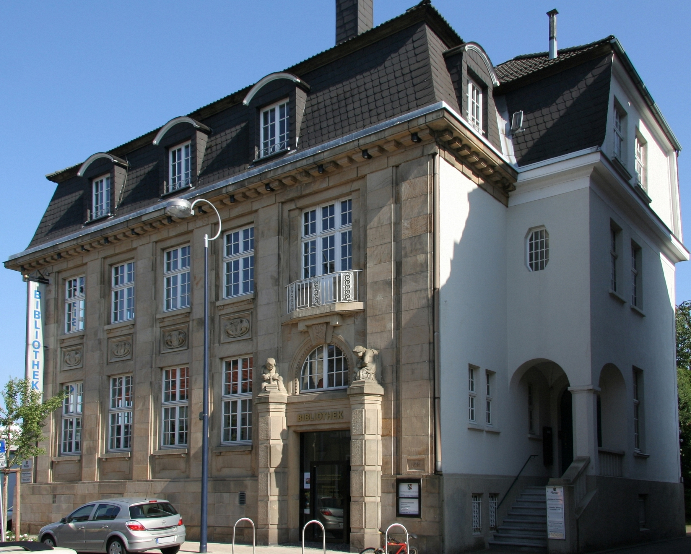 Bibliothek in Dortmund-Aplerbeck; erbaut 1914-1915 für die Amtssparkasse Aplerbeck